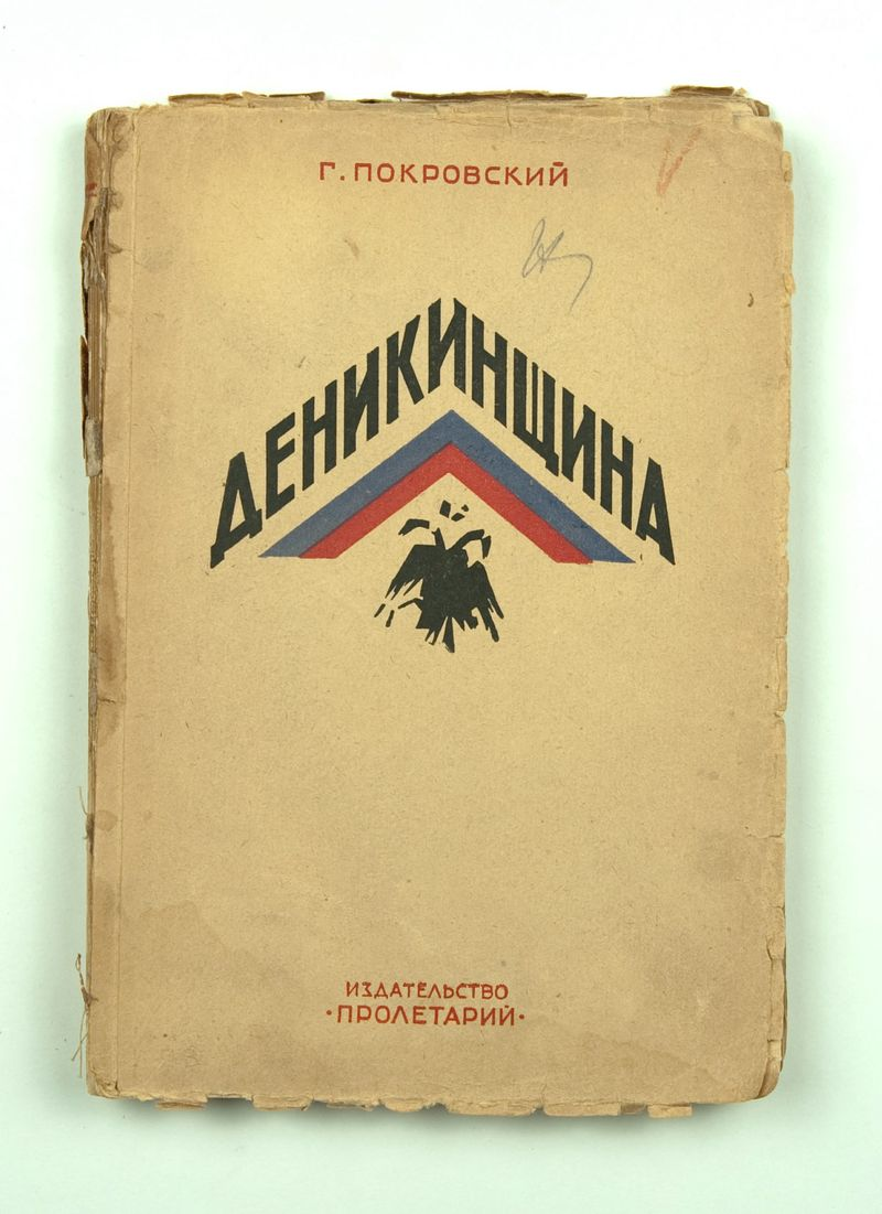 Титульная страница книги Покровский Г. Деникинщина. Год политики и экономики на Кубани (1918-1919 гг.) / Подготовил к печати и снабдил примеч. С. А. Алексеев. Под ред. и с предисл. В. И. Невского.. — Харьков: Пролетарий, 1926. — 234 с. — 4000 экз.